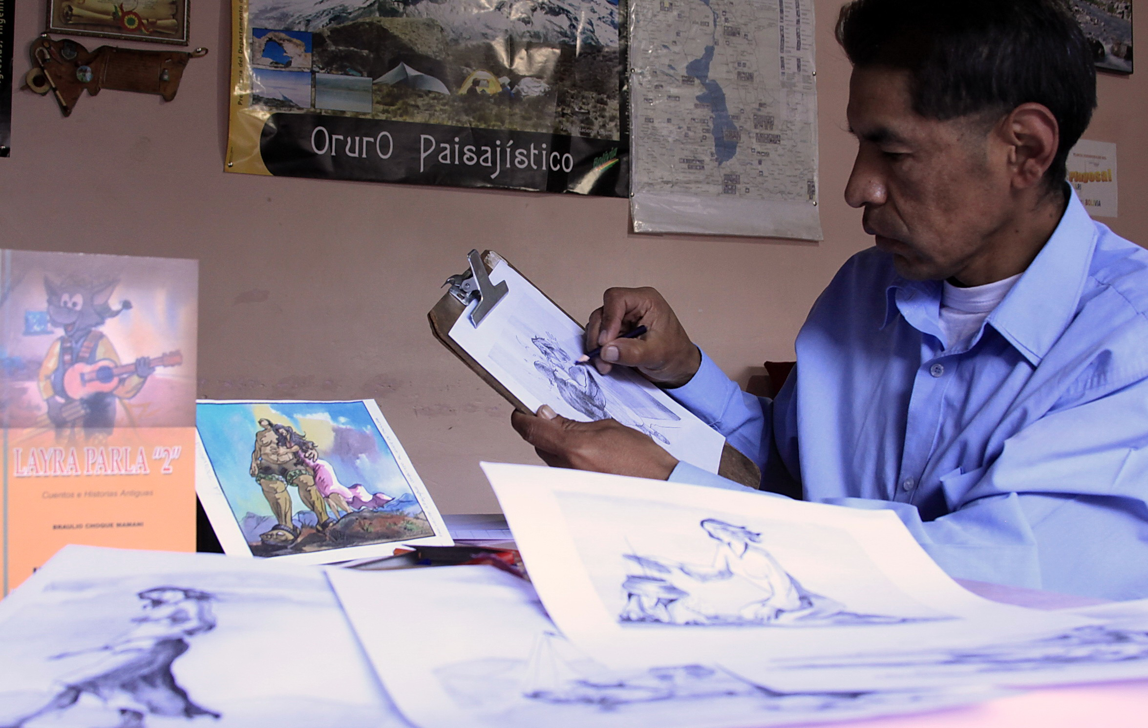 Braulio Choque, escritor, pintor y músico boliviano. Fotografía tomada por Javier Badani